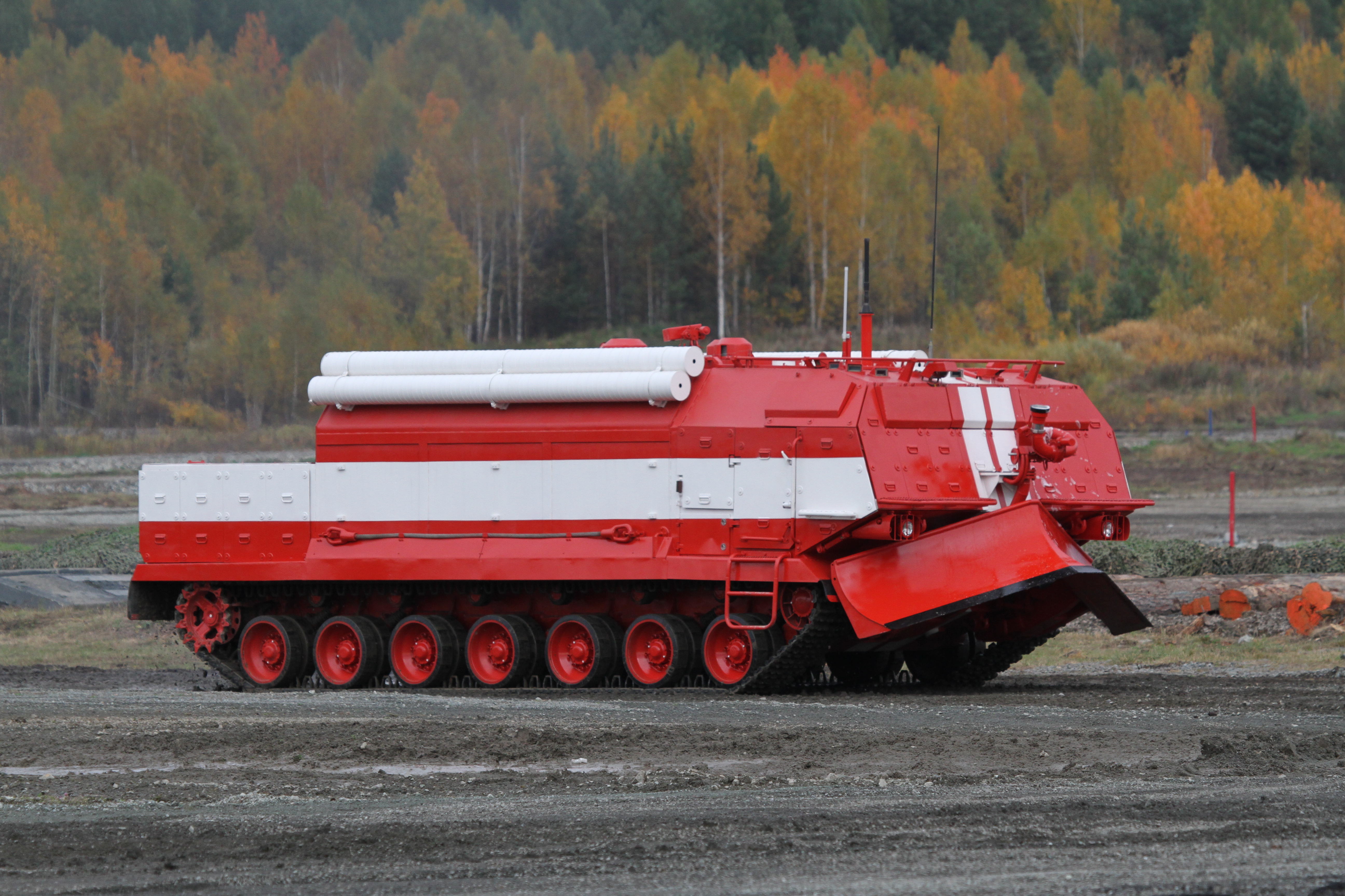 Специальная пожарная машина СПМ (Special firefighting vehicle SPM)